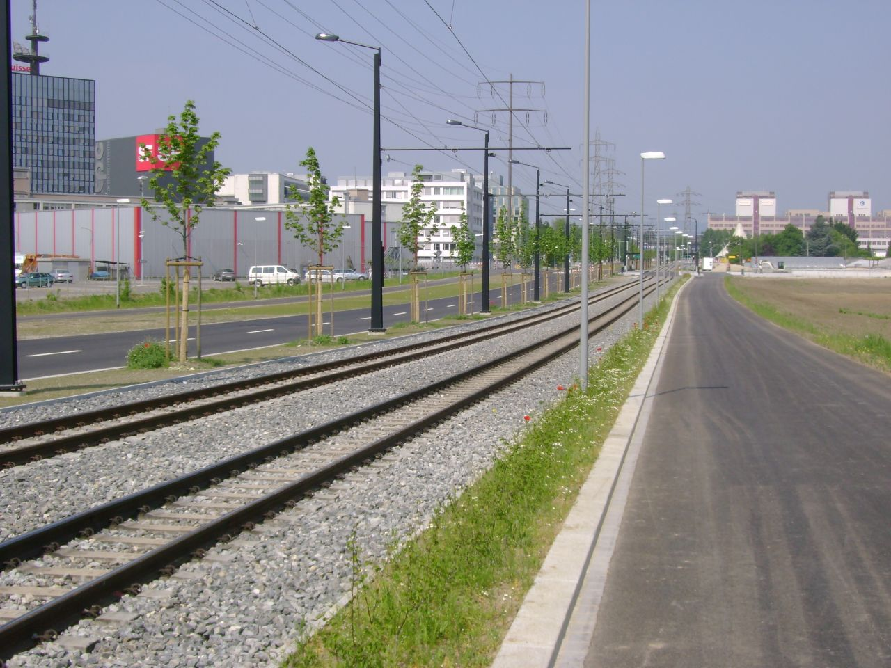 Glattalbahn Trasse beim Schweizer Fernsehen